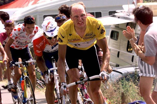 Bjarne Riis attaquant à Hautacam